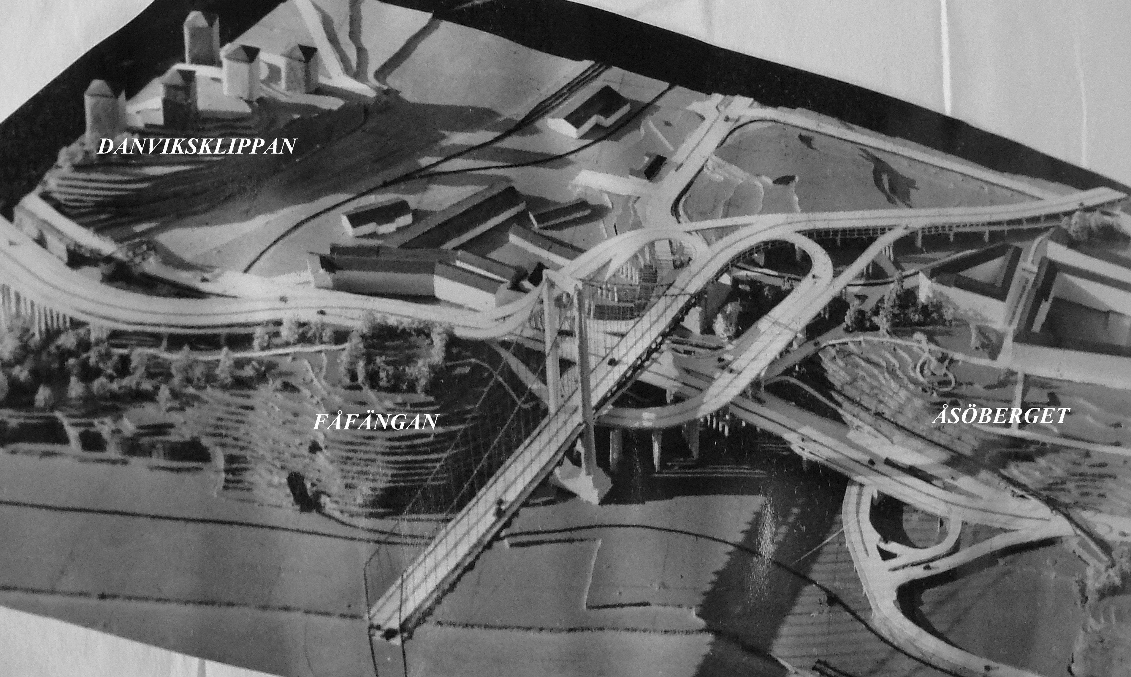 Stockholms stadsarkiv ritningsarkiv, Österledstävlingen, modellfoto